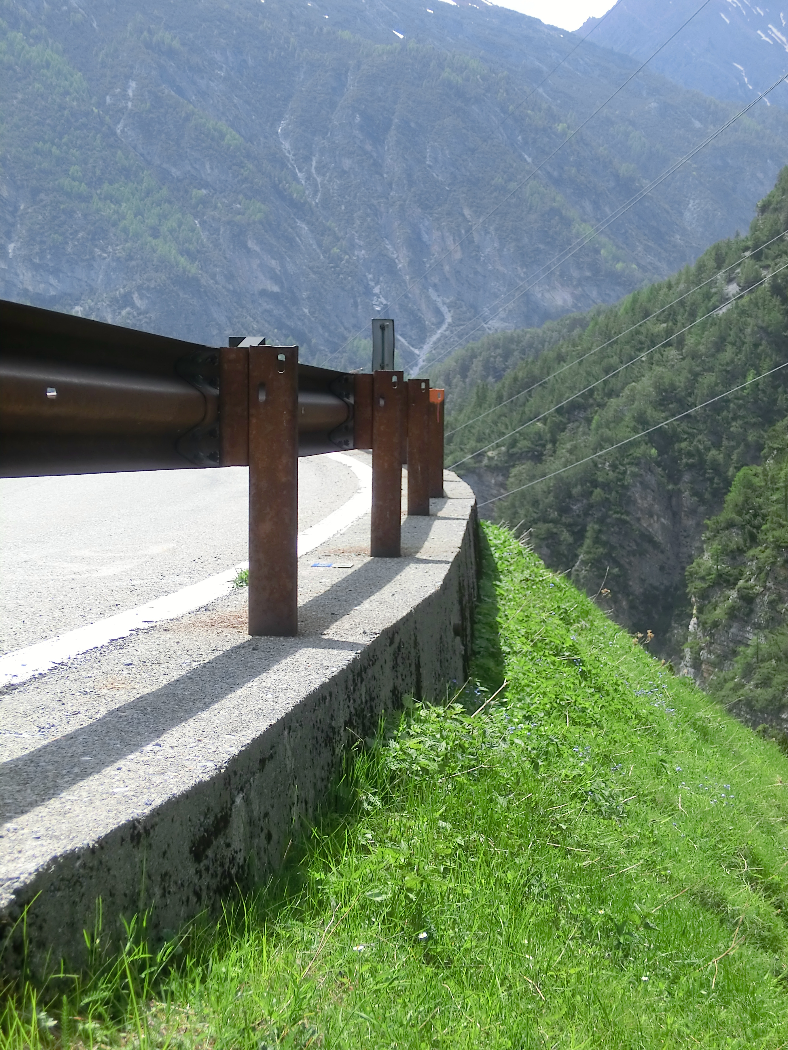 Дорога на перевал Стельвио открыта обычно только летом и в начале осени.